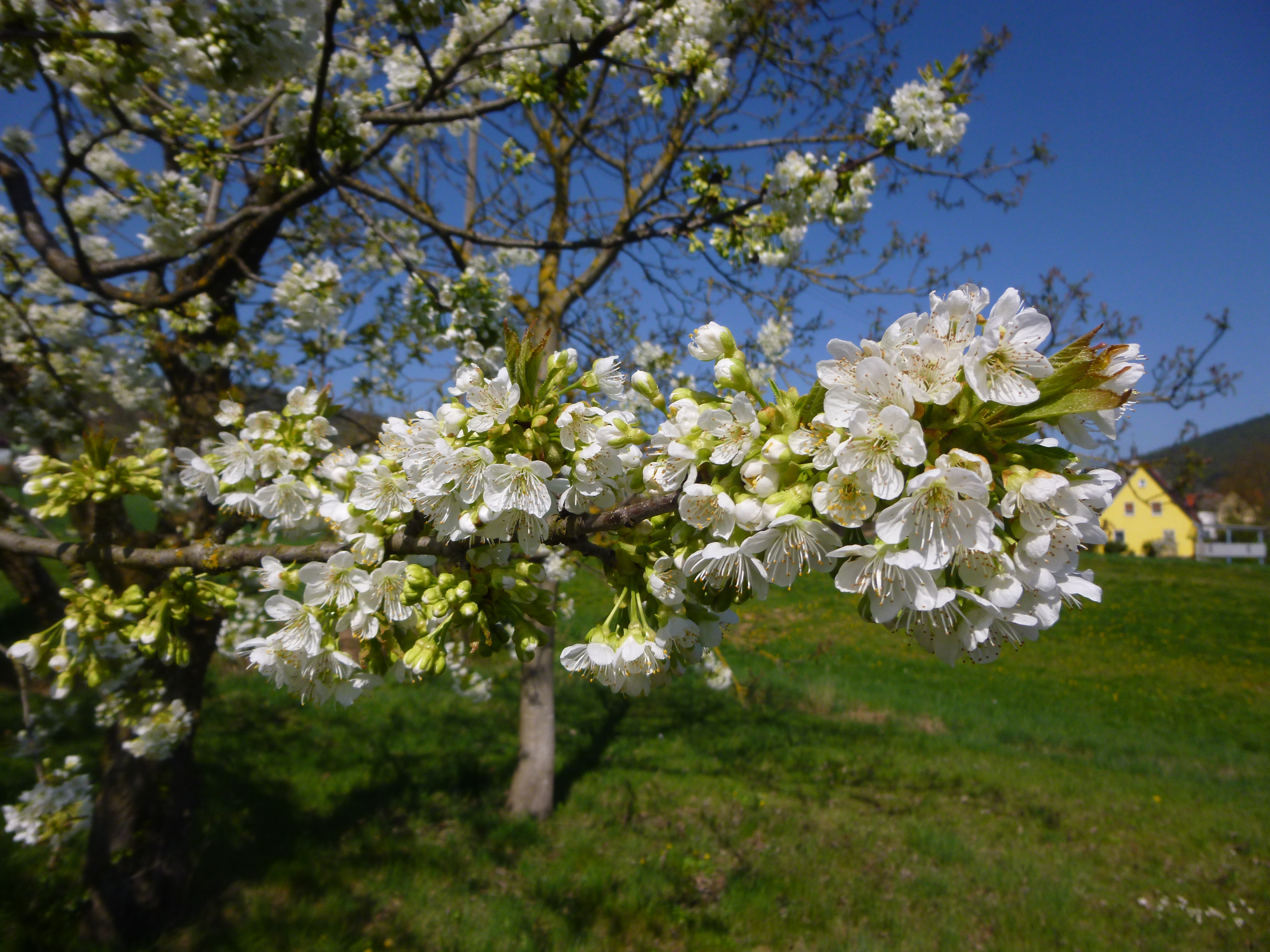 Blüte von Dönissens gelber Knorpelkirsche